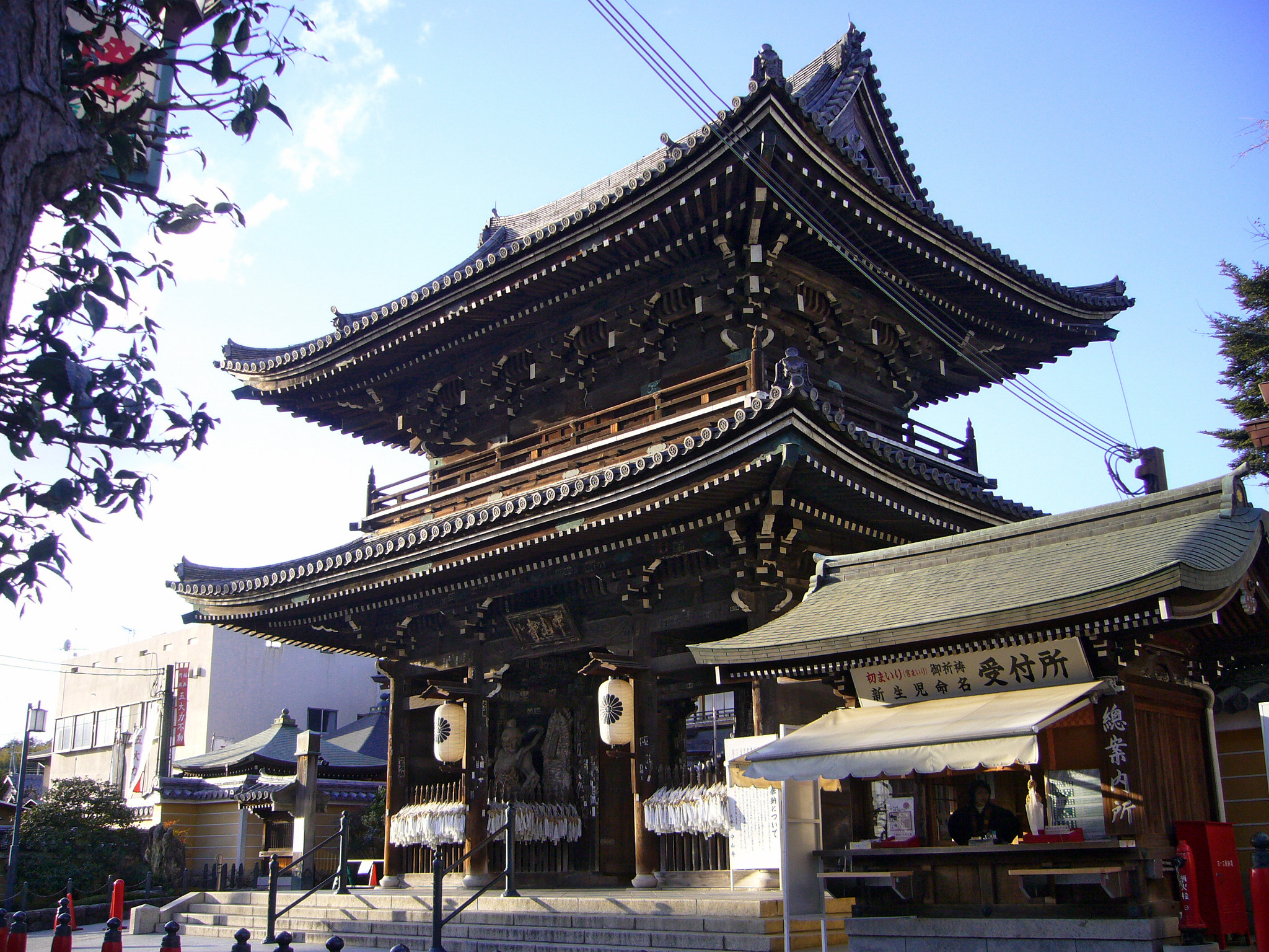 Nakayamadera in Takarazuka, Hyogo prefecture, Japan